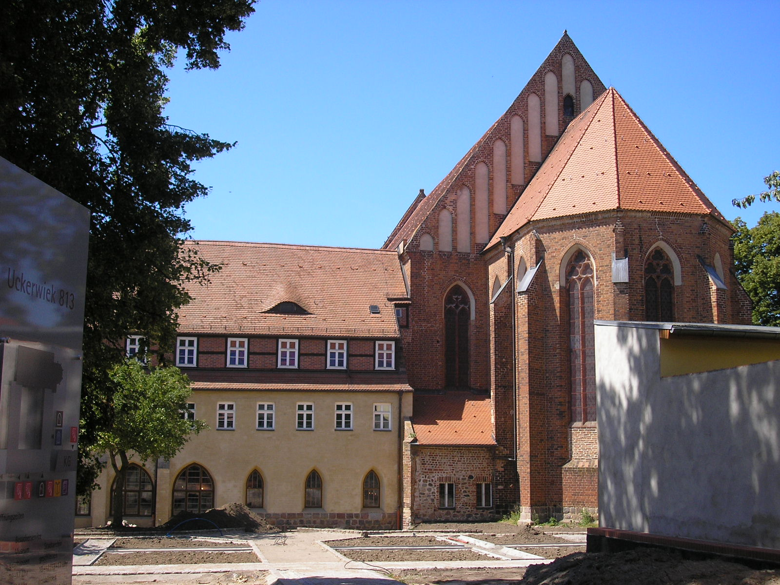 Teile der Kirche des Dominikanerklosters in Prenzlau (Brandenburg).